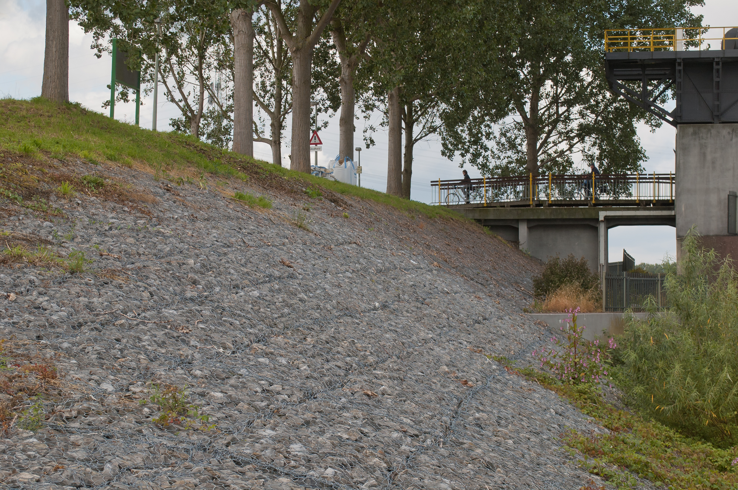 Gabionen als Uferbefestigung eines künstlich in einem Fluss angelegten Dammes (am Stauwehr in der Maas bei Linne, Niederlande)